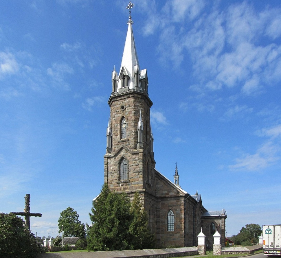 Касцёл у Ліпнішках